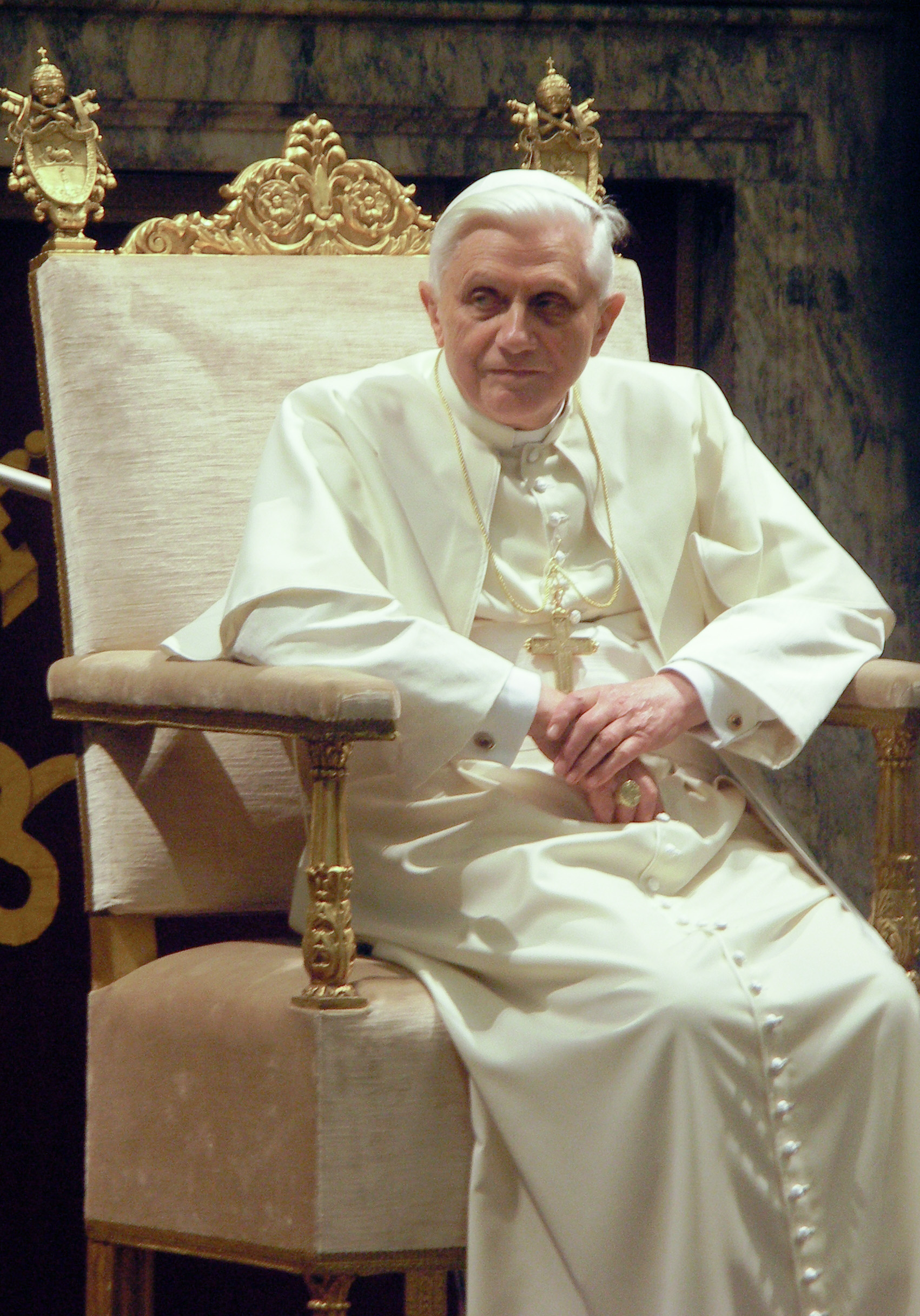 Pope Benedictus XVI